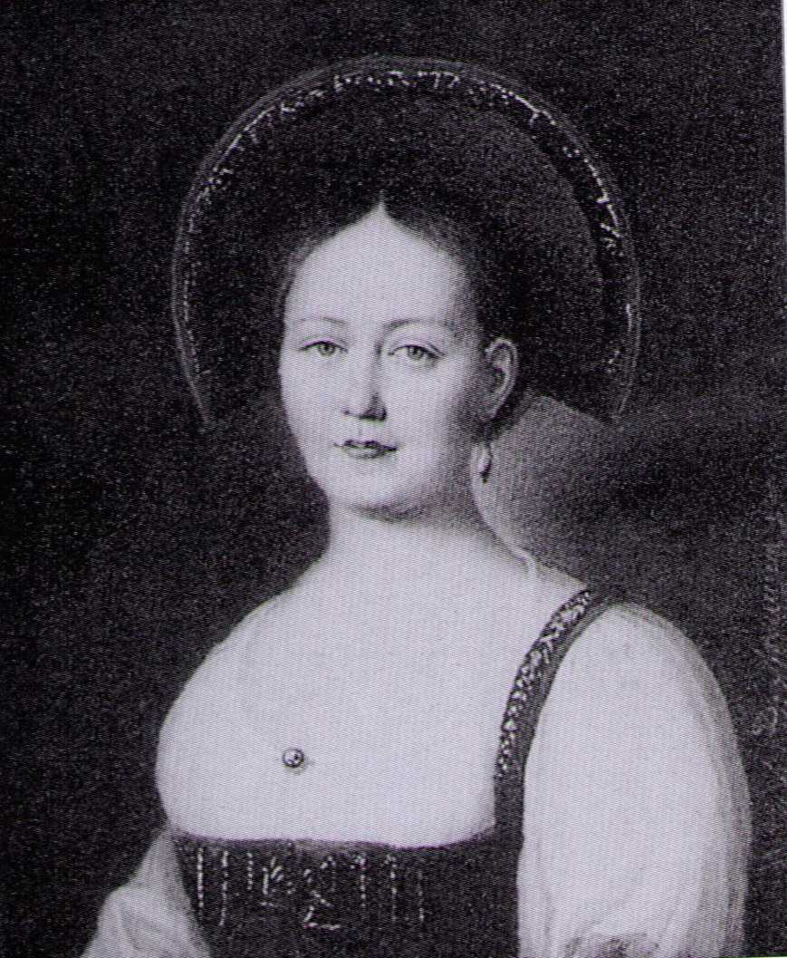 Barbara Golicyn